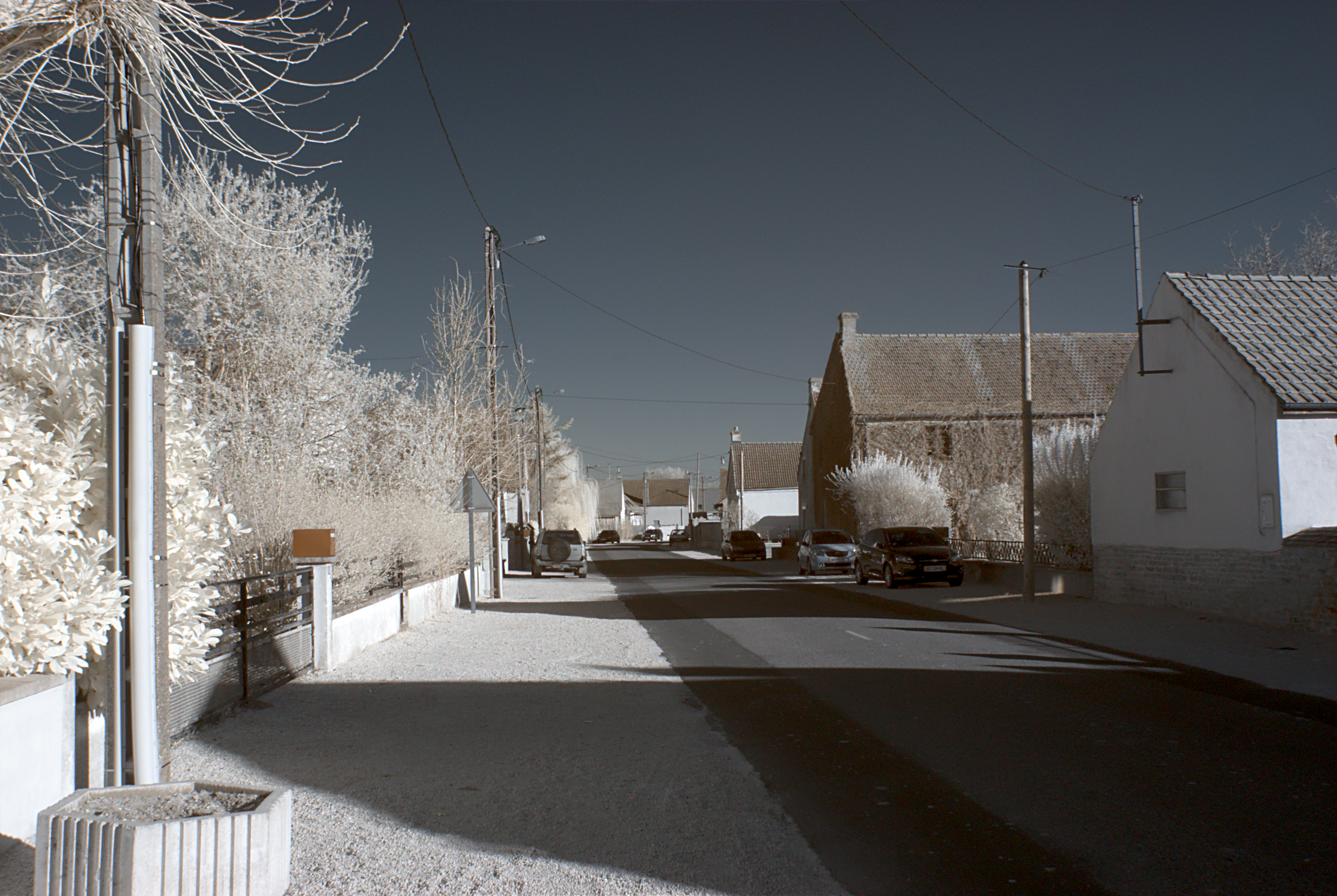 Rue d'Aval, Bessey-lès-Citeaux (Côte d'Or, Bourgogne, France) photographié avec un filtre infrarouge 720 nm.